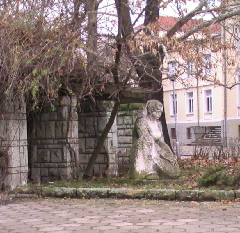 Статуя на входе в парк Горубсо, старейший парк города Кырджали.